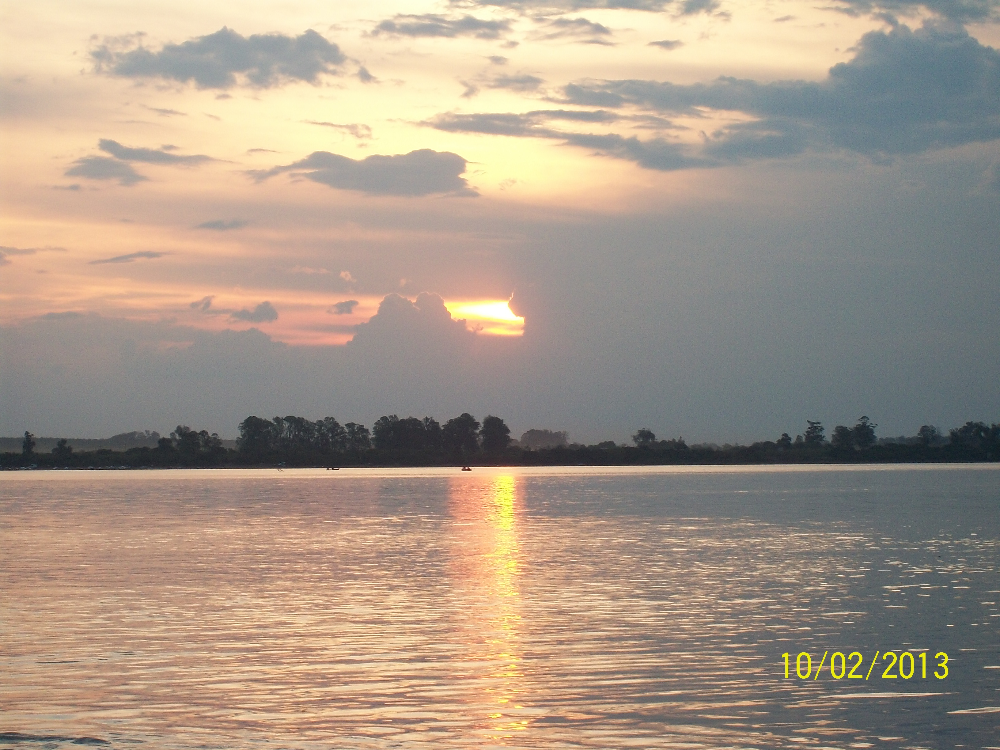 Monumento a Perpetuidad o Cementerio Viejo. Ubicada en el departamento de Paysandú